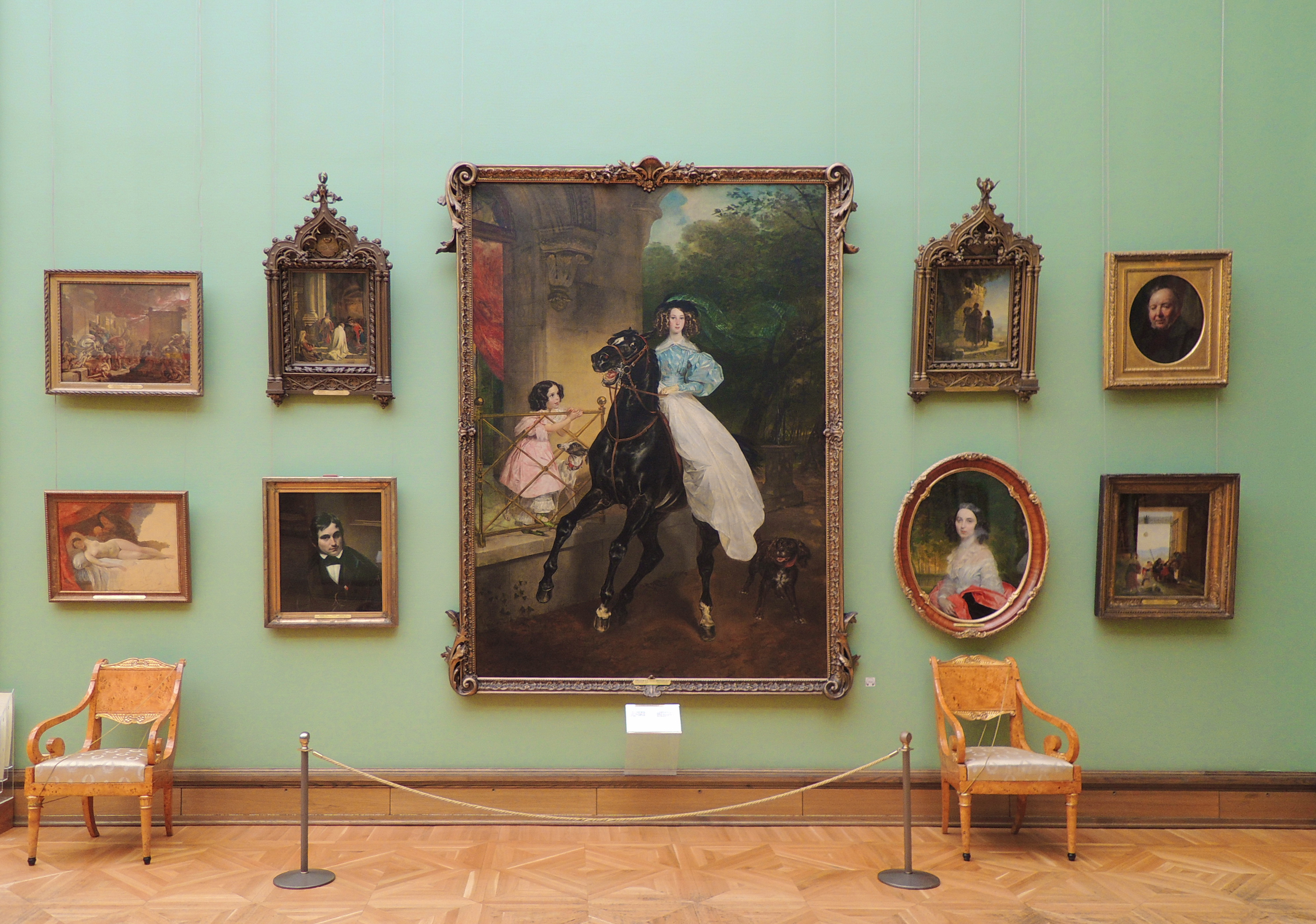 Зал Карла Брюллова в Третьяковской галерее